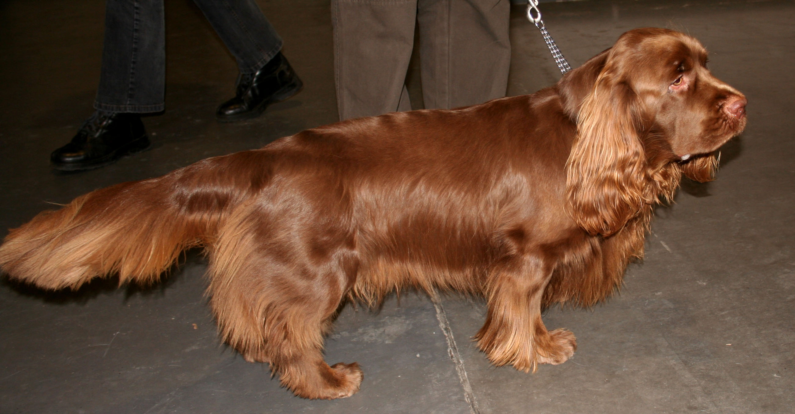 Sussex_spaniel na Światowej Wystawie Psów Rasowych w Poznaniu